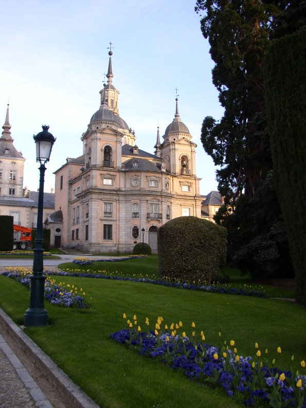 Segovia. (Castilla-León. España) La Granja de San Ildefonso. Palacio Real. Fotografia realizada el 22 julio de 2003 por el autor.User:Pelayo2